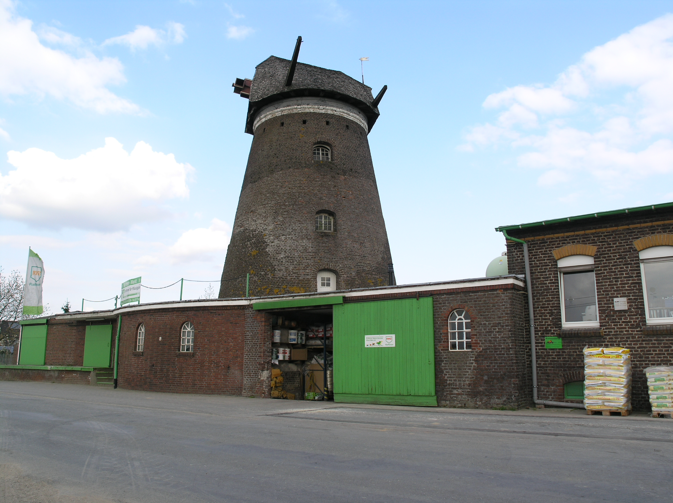 Kevelaer-Wetten Wettener Mühle